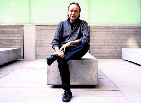 Joan Manuel Serrat durante su gira 100x100 Serrat